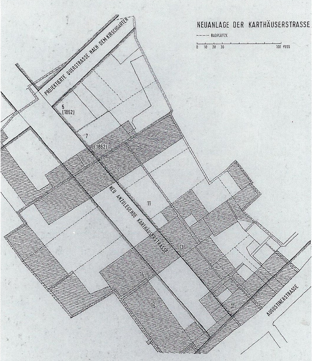 Bebauungsplan des Neubaus der Kartäuserstraße in Mainz-Altstadt